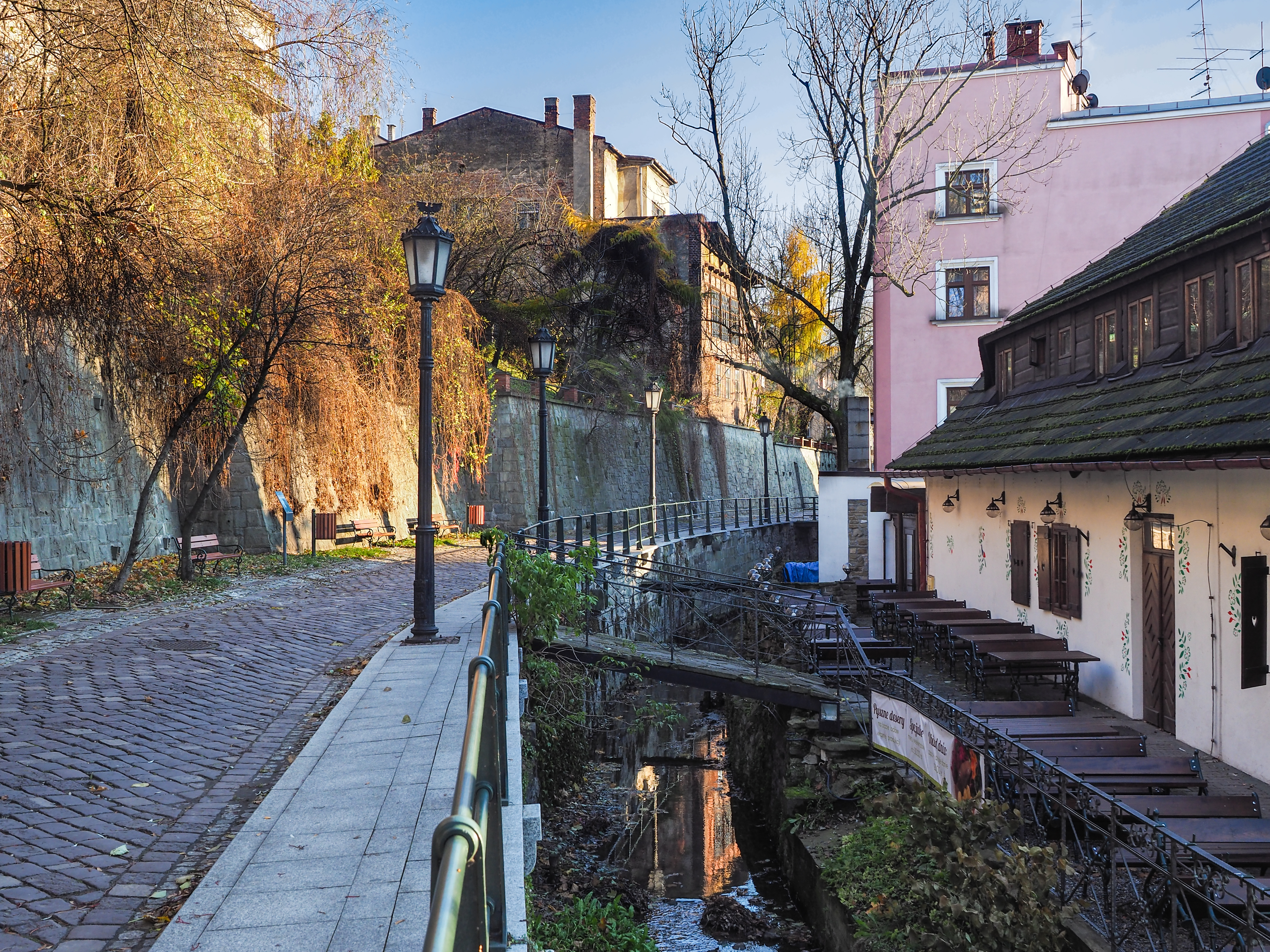 Cieszyn, Ulica Przykopa z murami oporowymi Wikidata has entry Q30060447 with data related to this item.